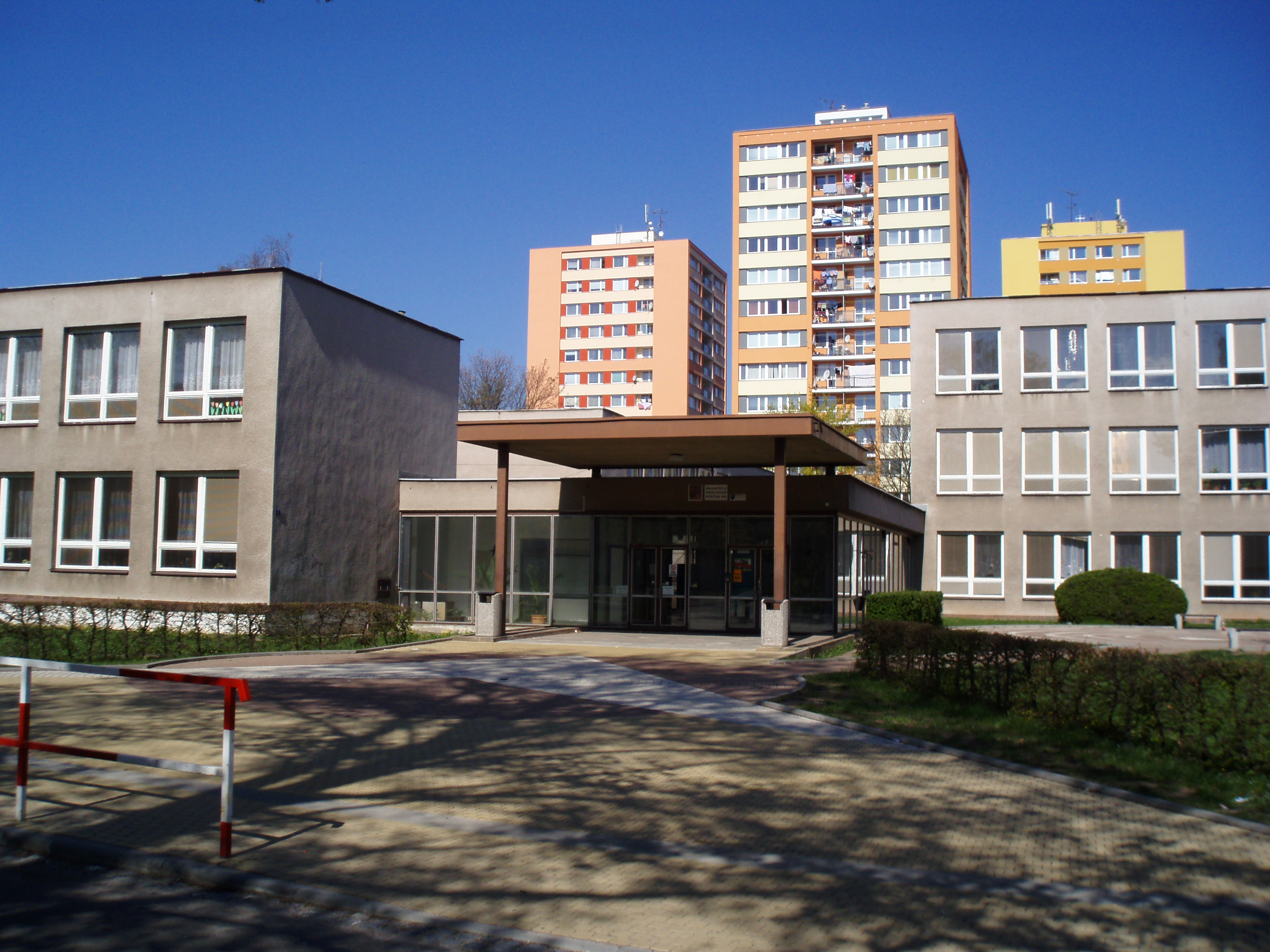 Základní škola Bezručova (Hradec Králové)